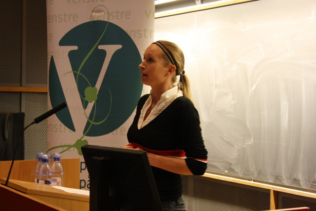 Julie Andersland